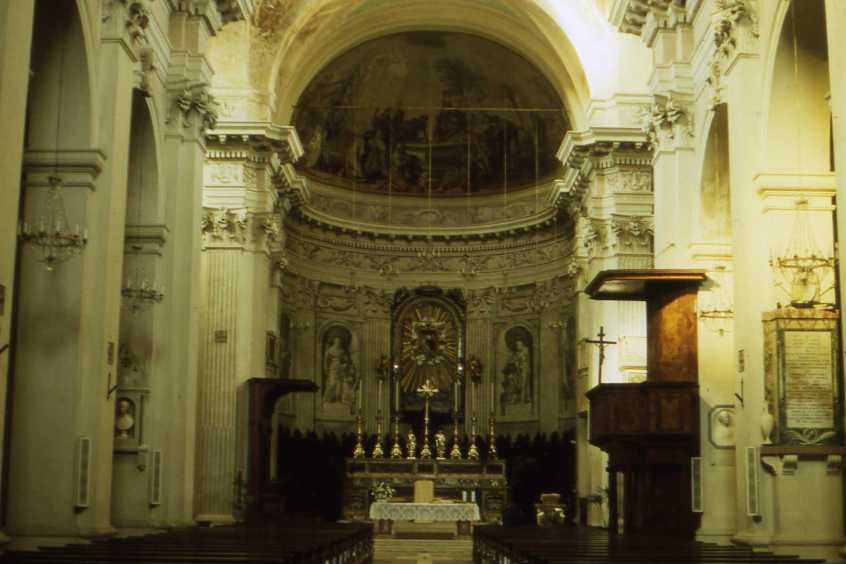 Cagli, Basilica Cattedrale, Part. interno navata centrale e presbiterio.